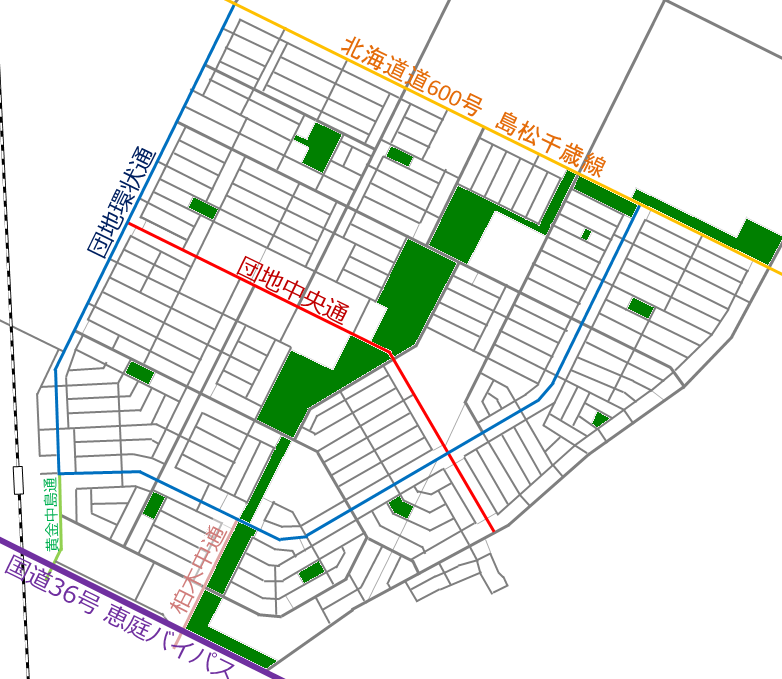 恵み野幹線道路